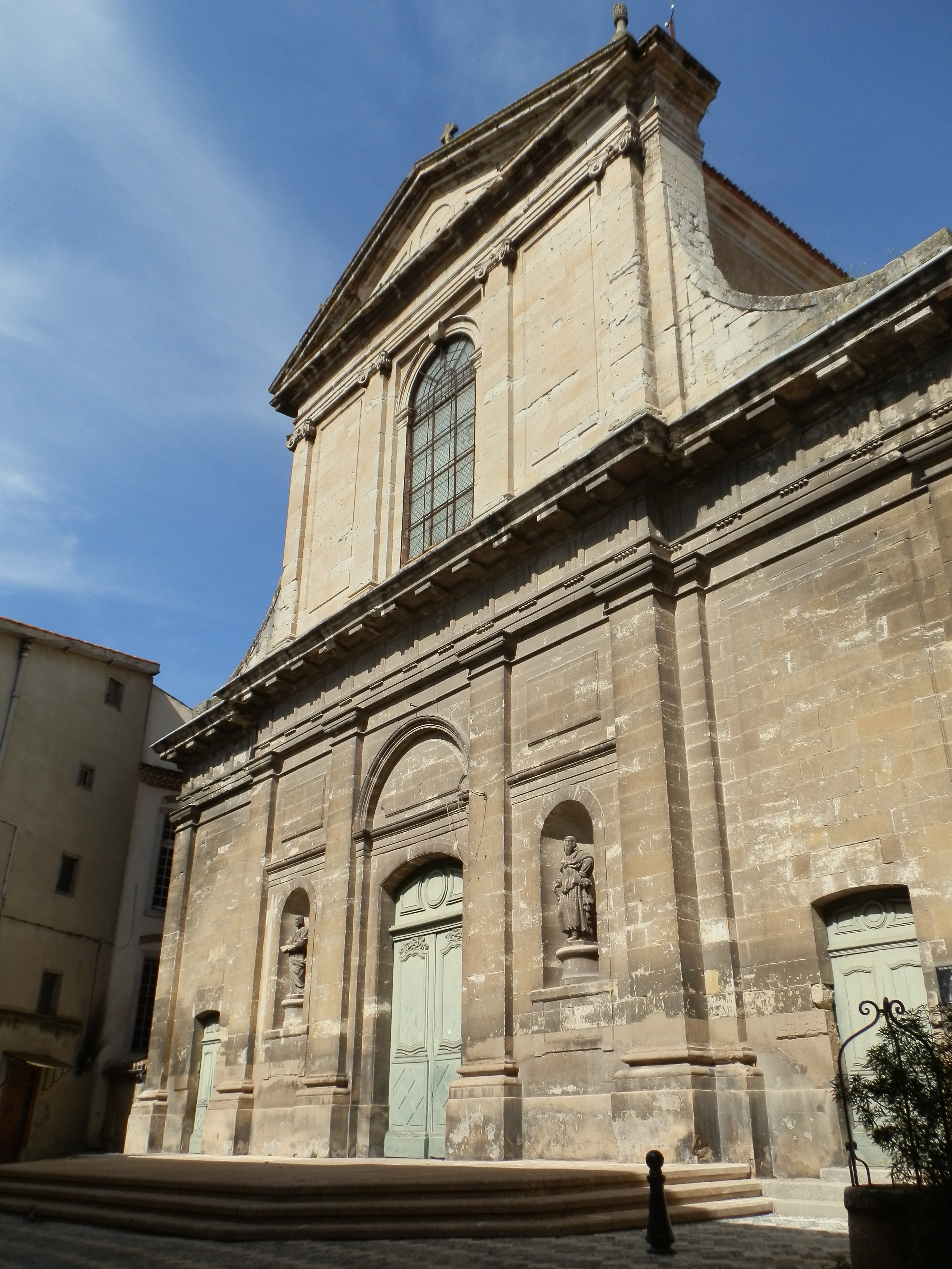 Église Notre-Dame-de-la-Platé de Castres, 32 rue Victor Hugo (Classé, 1987) .